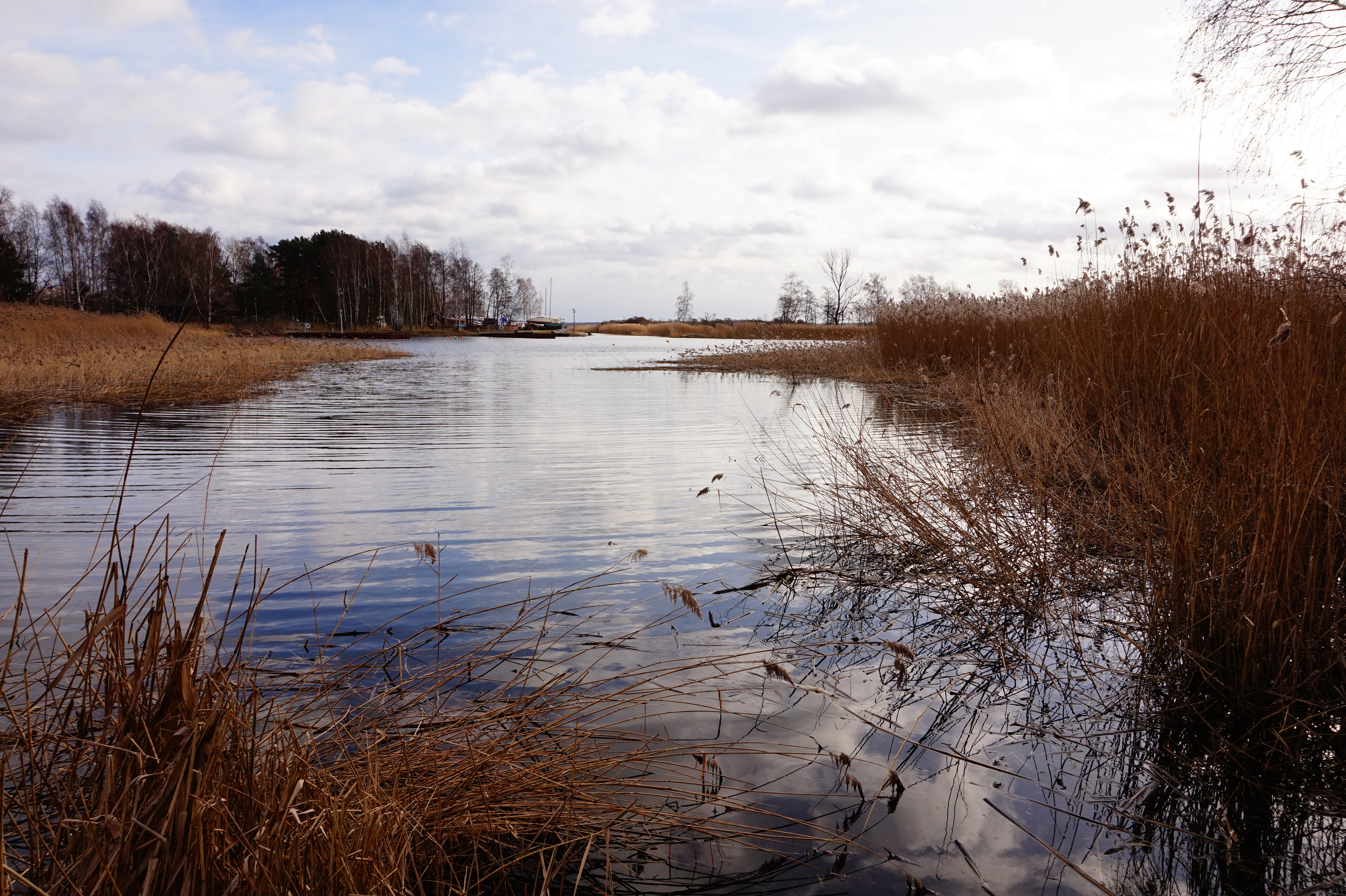 Gdańsk Górki Zachodnie - widok na fragment tzw. "Zielonych Wysp"